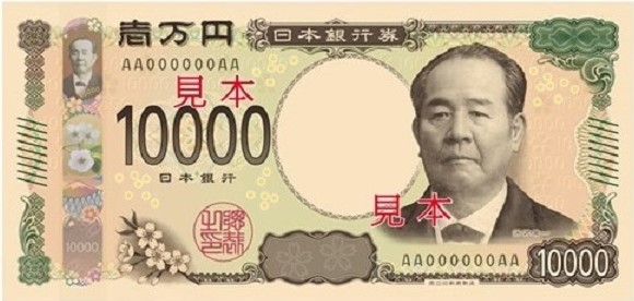 2024年度発行予定の10000円札見本